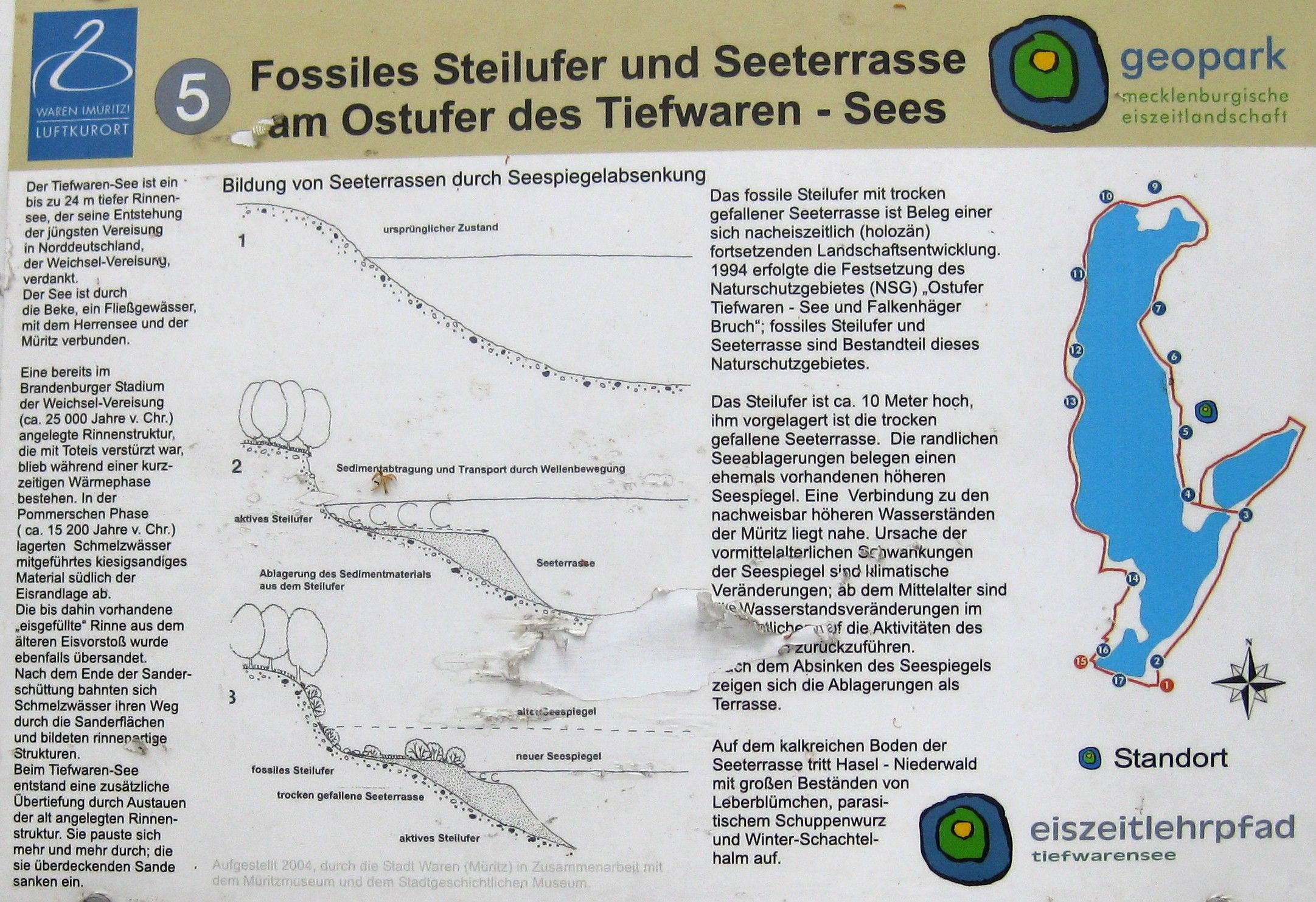 Erläuterungstafel an Station 5 des Eiszeitlehrpfads Tiefwarensee (Steilufer und Seeterrasse am Ostufer des Tiefwarensees).